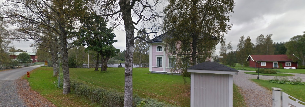 Gideå herrgård, en av de mest nordligaste herresättena i Sverige. Bruksherrgård från tidigt 1800-tal.